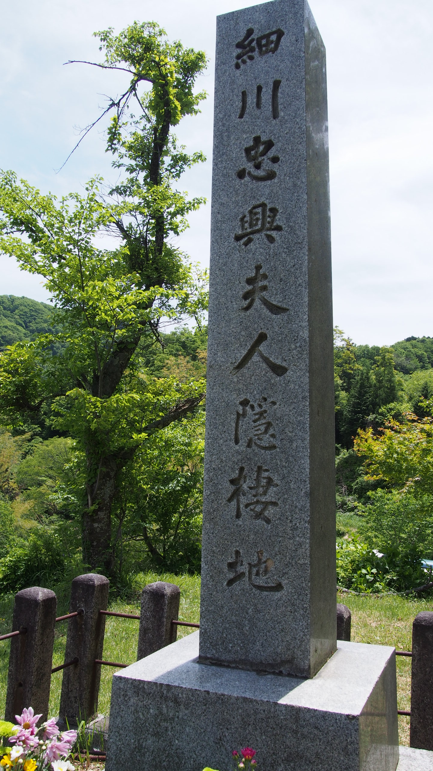 「細川忠興夫人隠棲地」碑（京都府京丹後市弥栄町須川〔味土野〕）